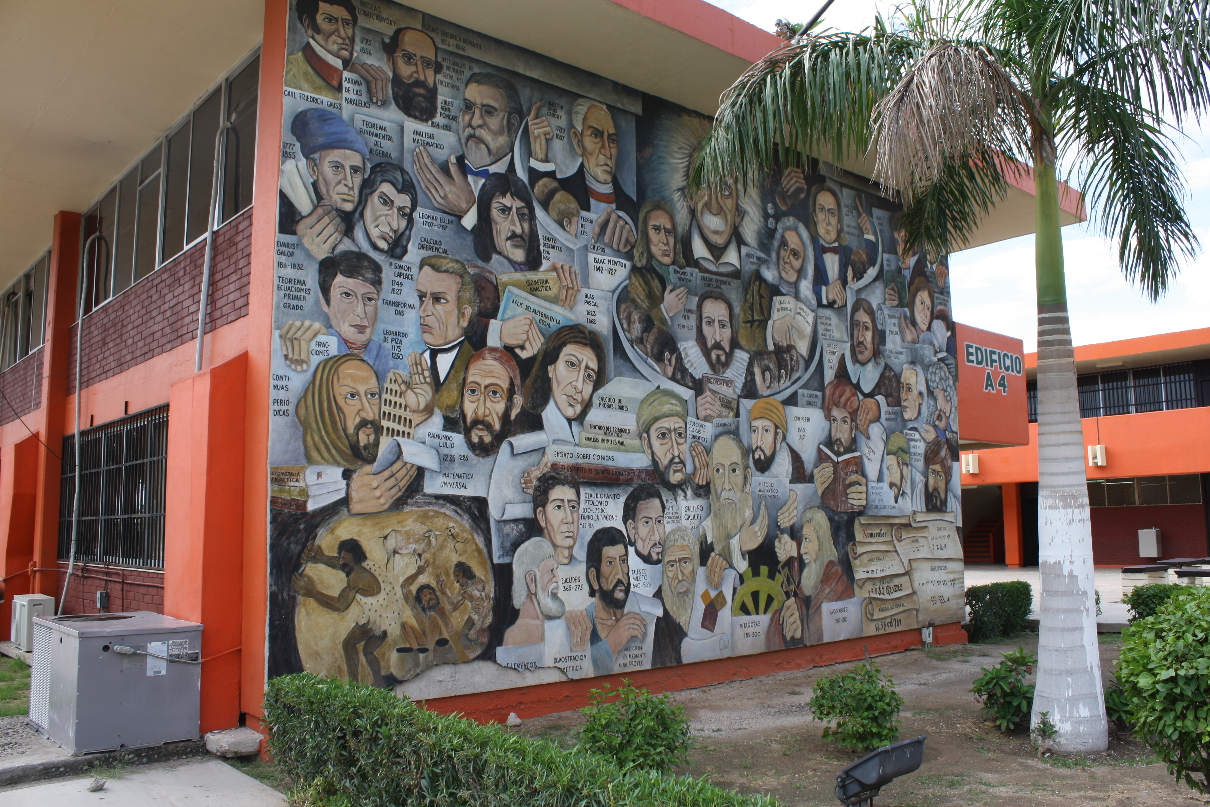 Vista general del mural que se encuentra en el edifico A 4 del Instituto Tecnológico de Hermosillo.